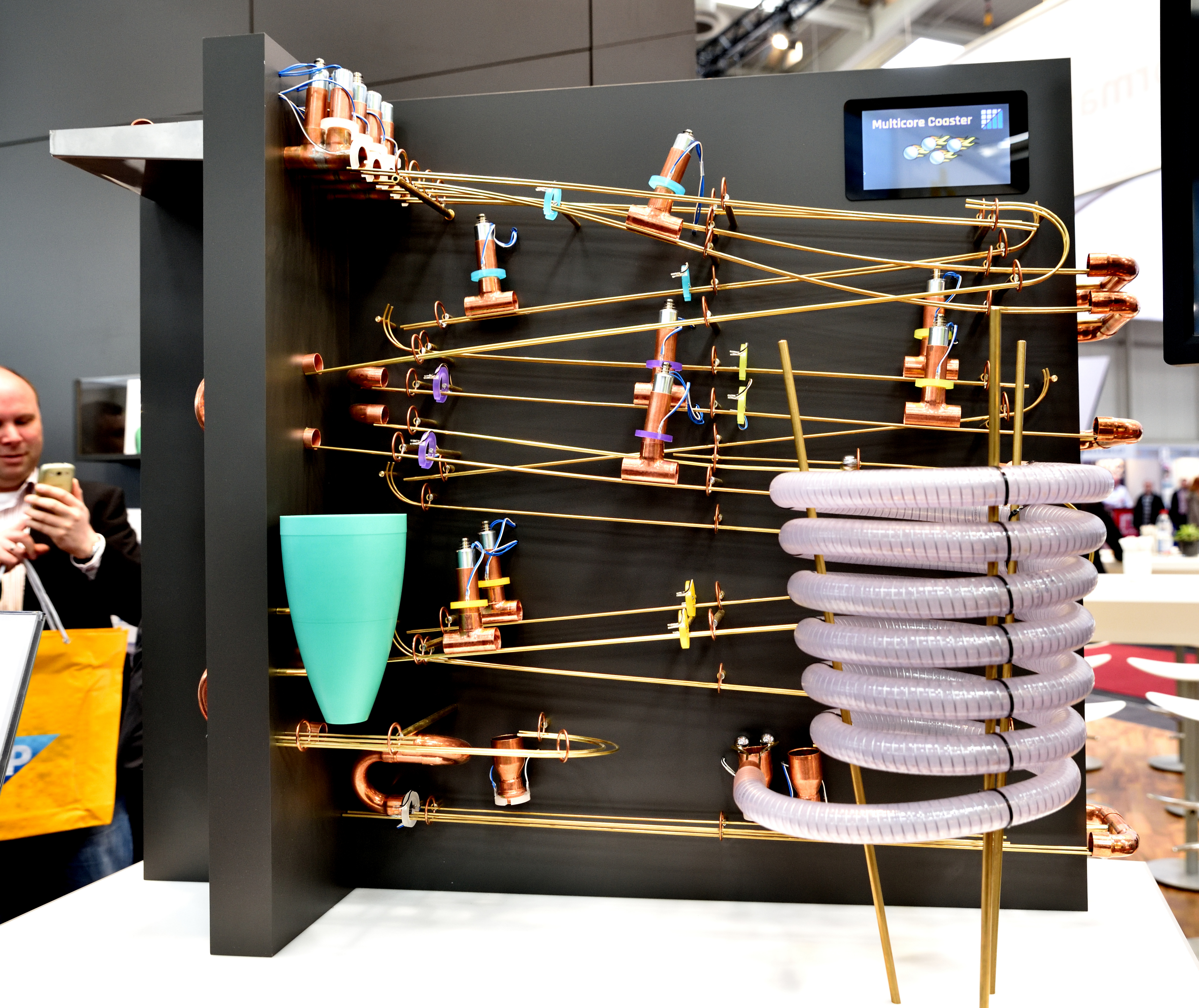 Emmtrix Kinetische Parallele Kugelbahn auf der CeBIT 2016 in Hannover